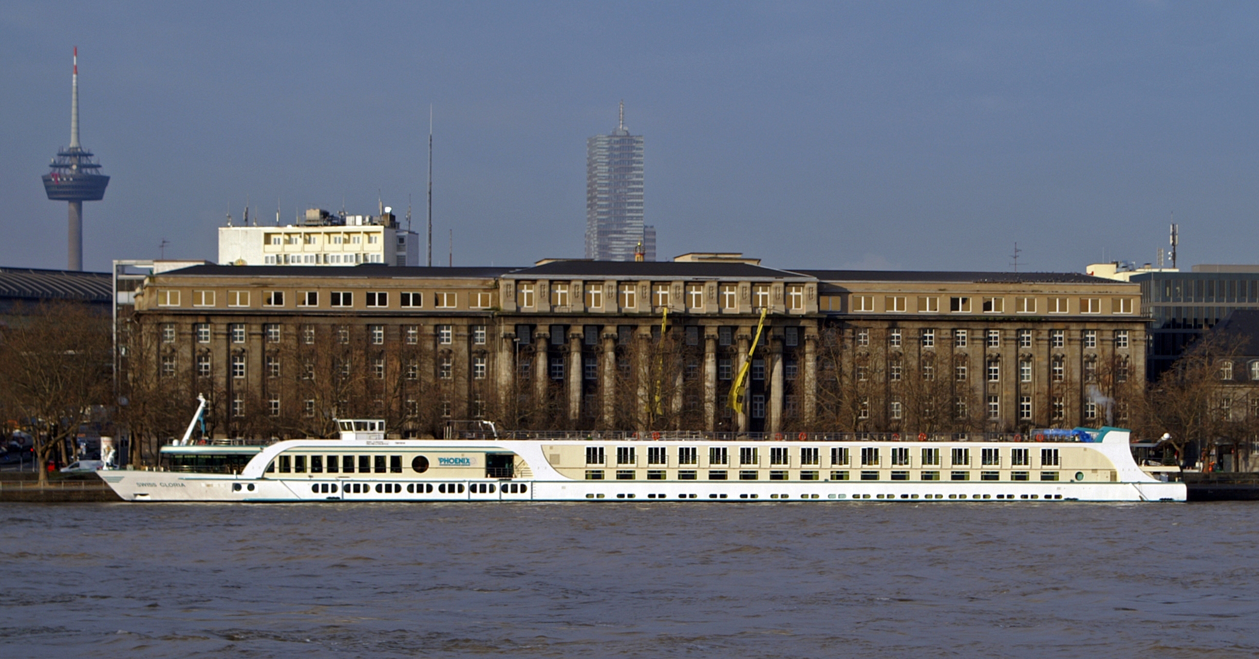 Swiss Gloria am Konrad-Adenauer-Ufer in Köln